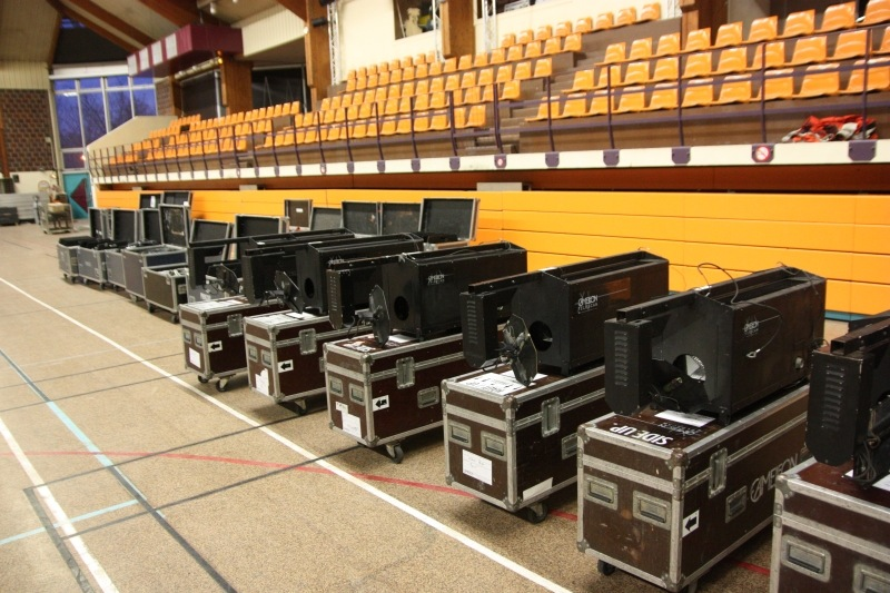 téléscan markIV pendant l'instalation d'un spectacle en decembre 2009